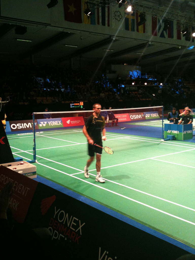 Denmark Open 2011, Jan Ø. Jørgensen